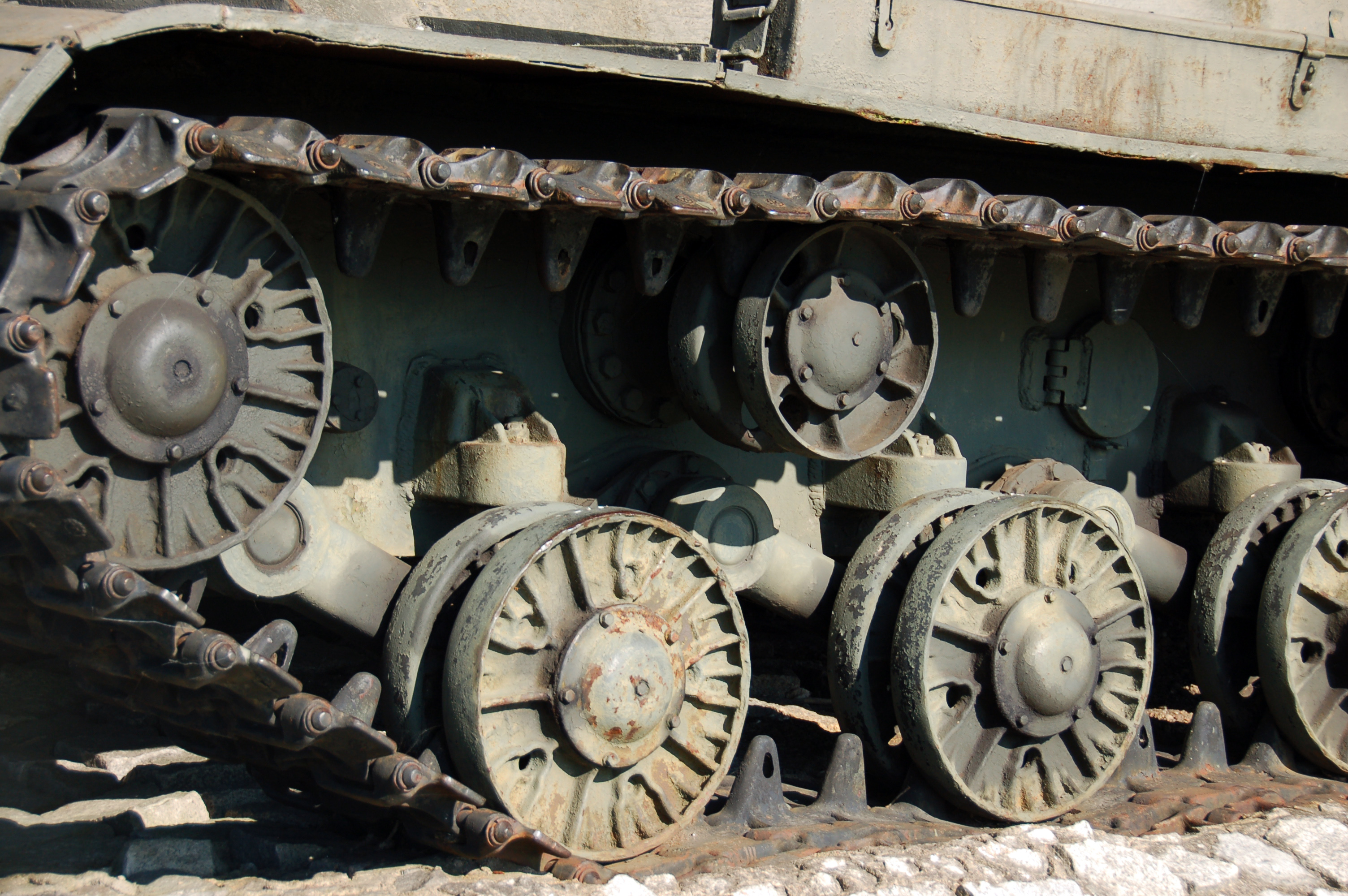 polnisches Oderbruch bei Siekierki polnischer IS-2